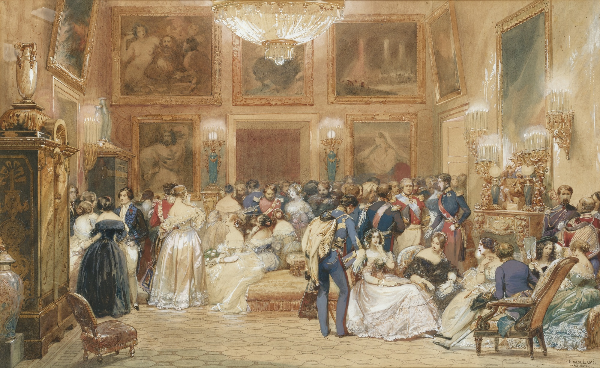 Une soirée chez le duc d'Orléans au pavillon de Marsan. On reconnaît le duc debout devant la cheminée en uniforme bleu et pantalon rouge avec le cordon rouge de la Légion d'honneur. À sa droite, en rouge : l'ambassadeur d'Angleterre. Assise de face la duchesse d'Orléans son épouse, vêtue d'une robe blanche. Debout de face à droite, dos à la cheminée : Lamoricière, les cheveux bruns.